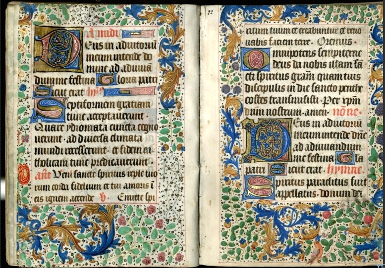 Double page des Heures à l'usage de Rome, Saint-Omer, Atelier des Vigneteurs de Mansel